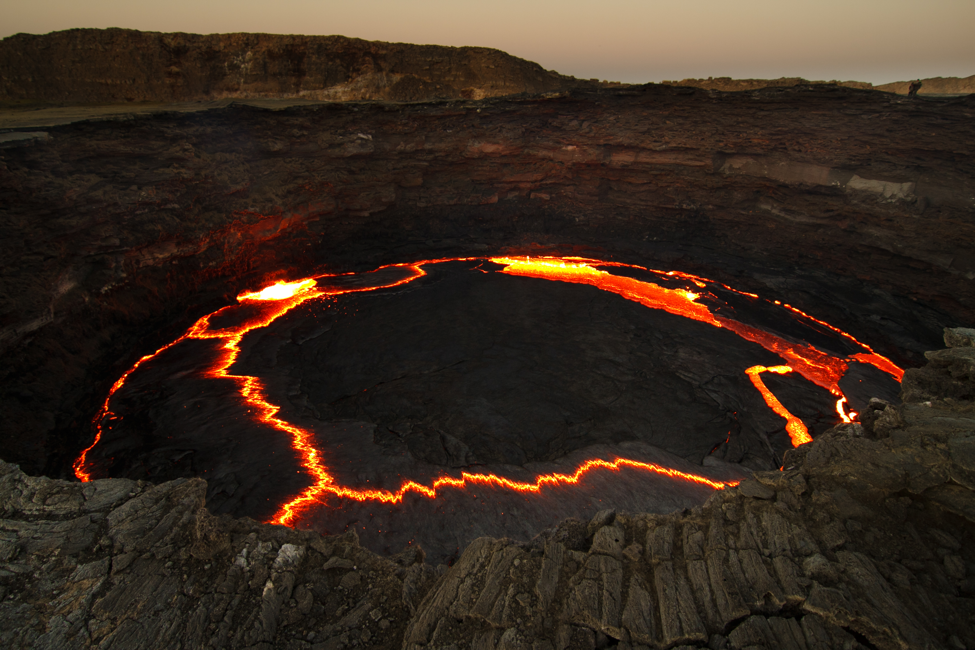 Lava lake of Erta Ale in Ethiopia.